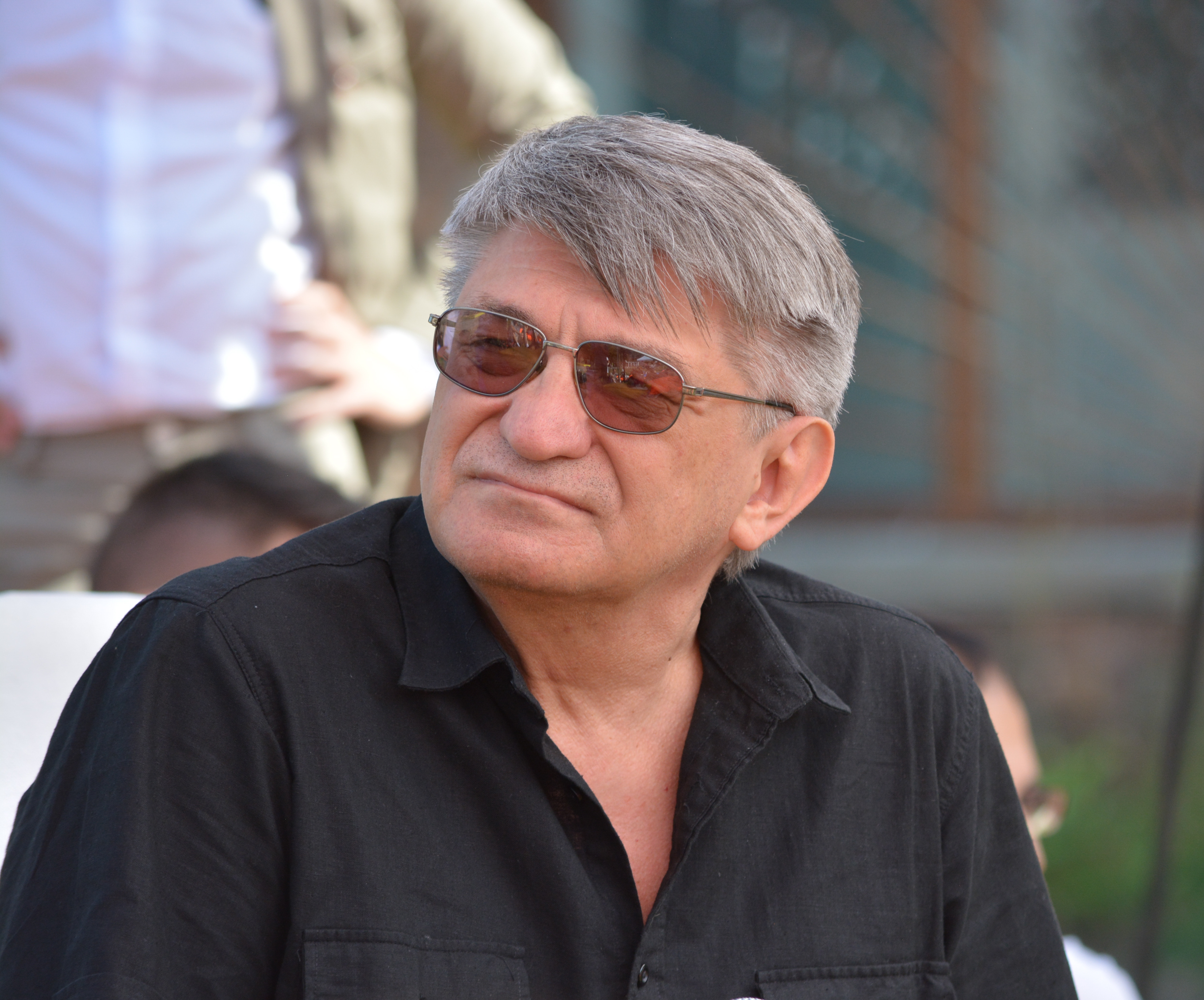 Александр Сокуров на фестивале «Открытая Библиотека. Хроника текущих событий», прошедшем 2 августа 2014 года в Сестрорецке